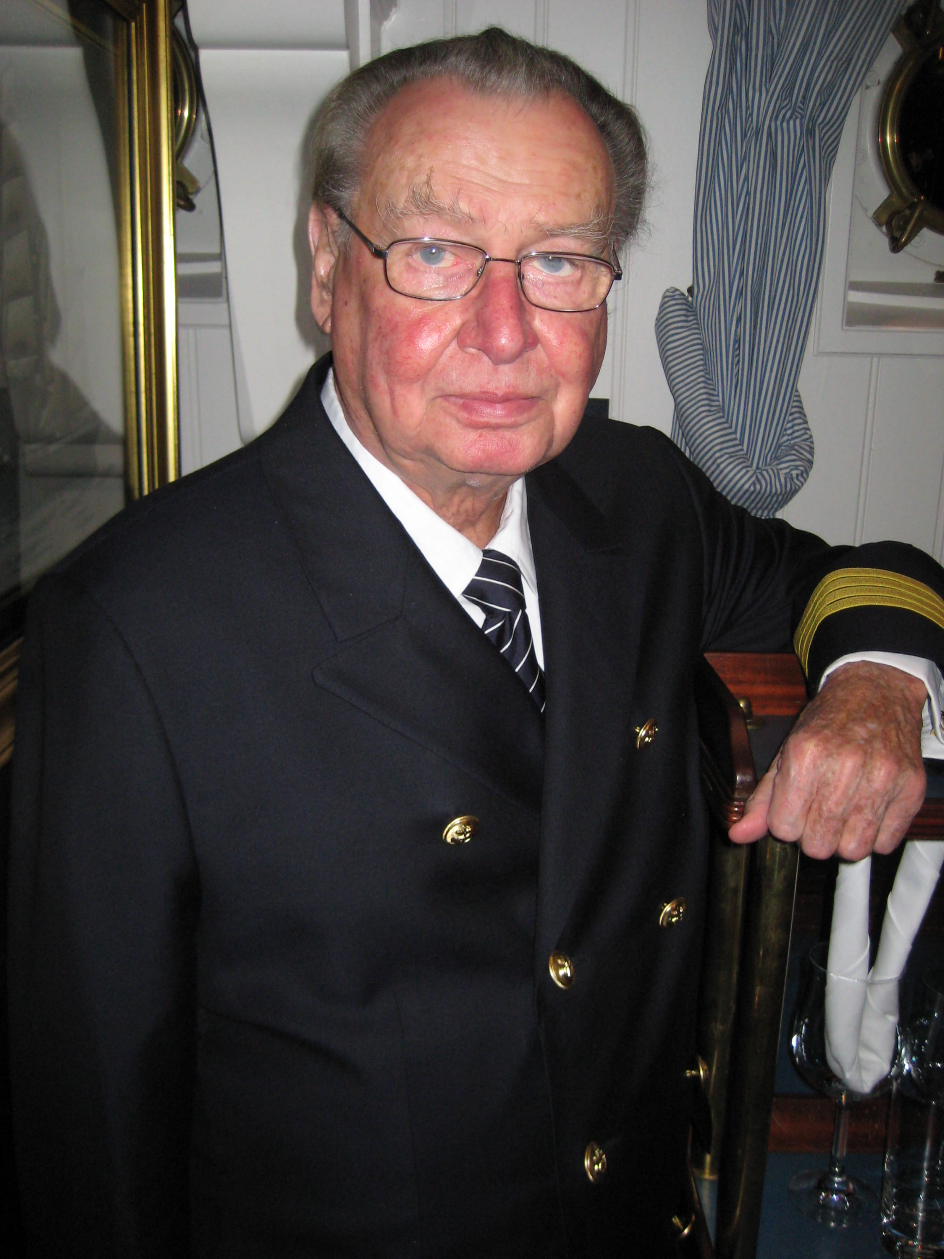 Peter Tamm 2008 in der Uniform des Ehrenkapitäns der Stiftung Rickmer Rickmers, fotografiert anlässlich der Ernennung Uwe Seelers zum 16. Ehrenkapitän